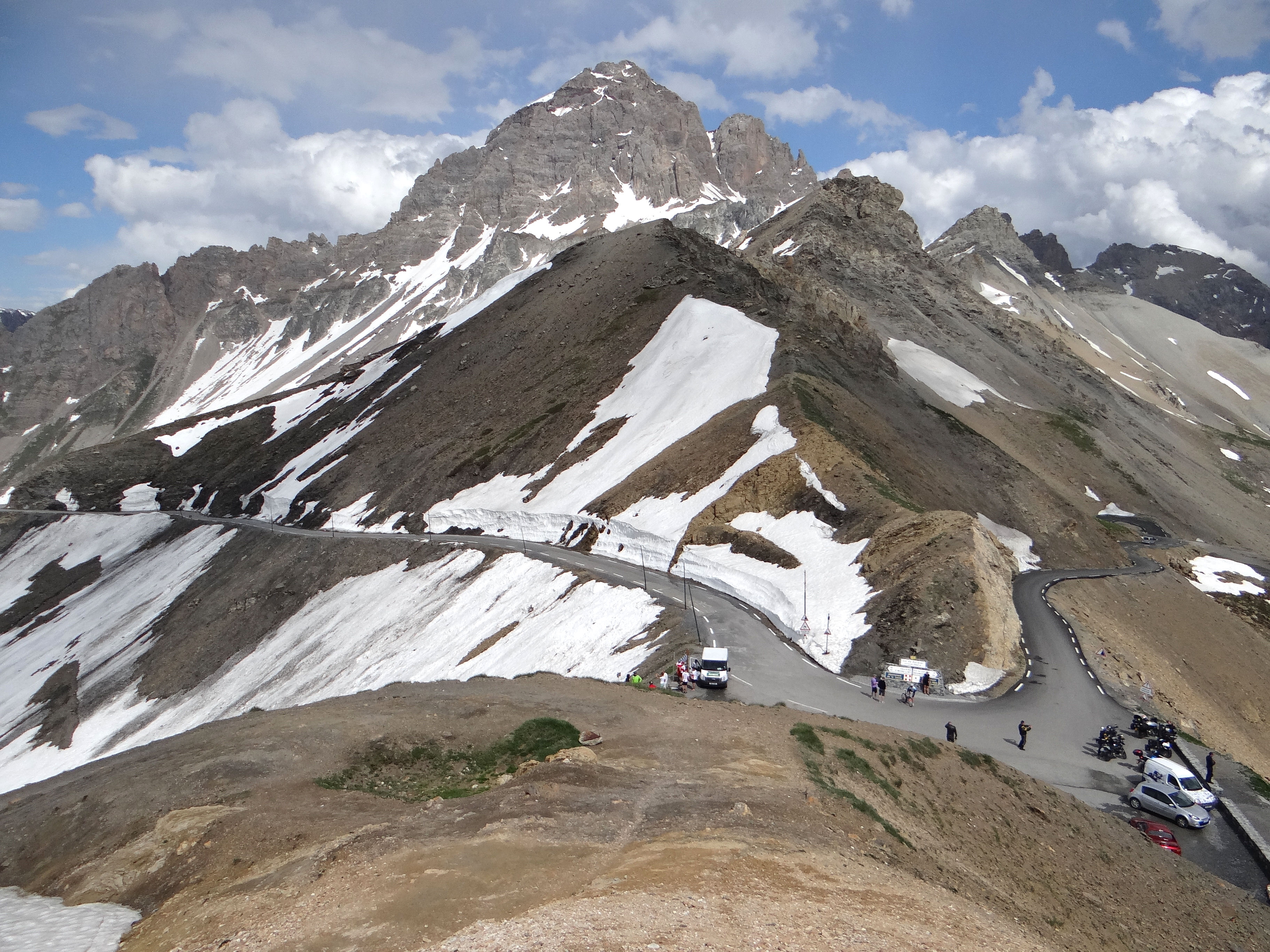 Le massif du Galibier dominé par la Roche du Grand Galibier (3220 m) et le col du Galibier